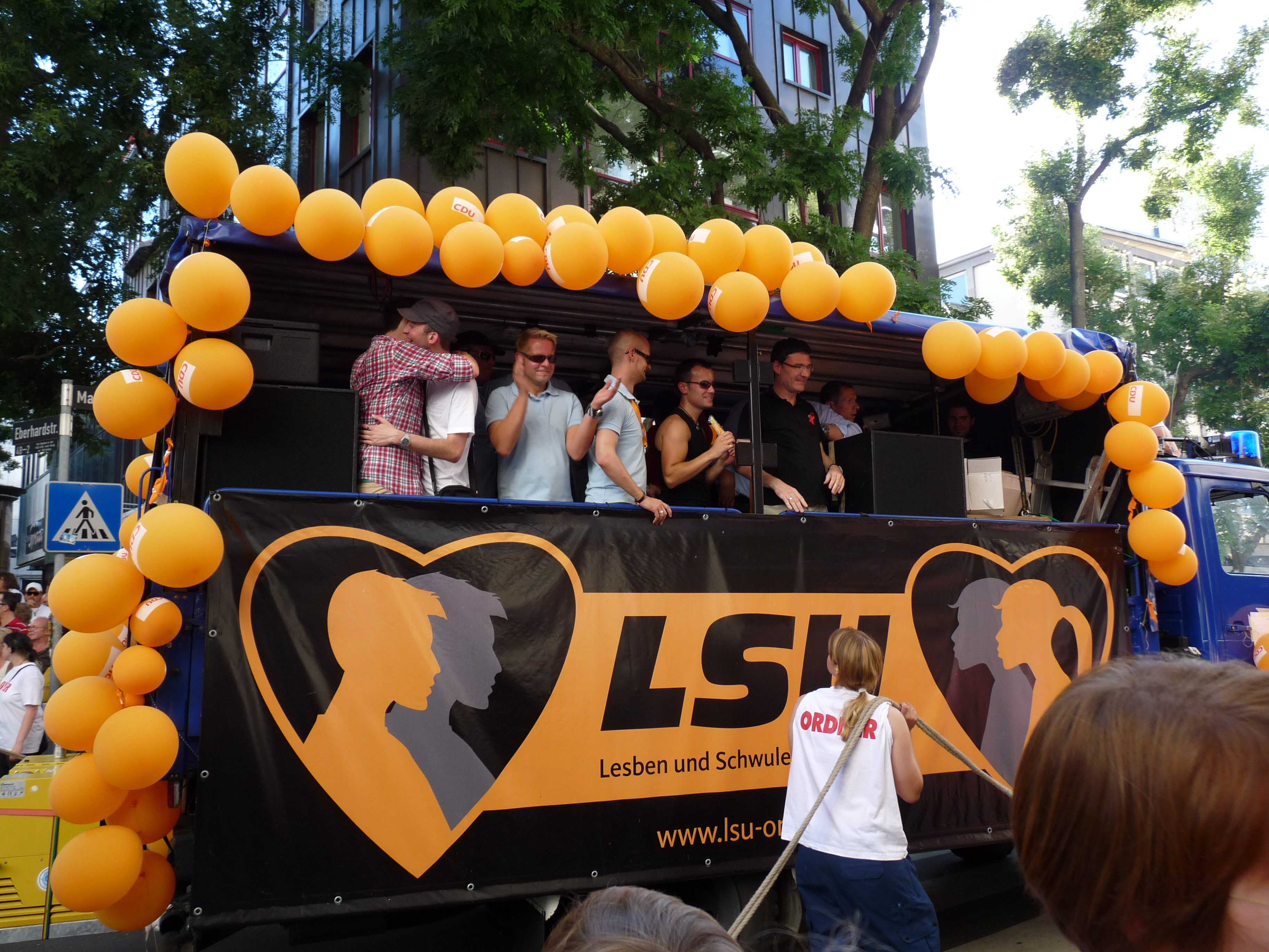 Stuttgart_-_CSD_2009_-_Parade - Lesben und Schwule in der Union